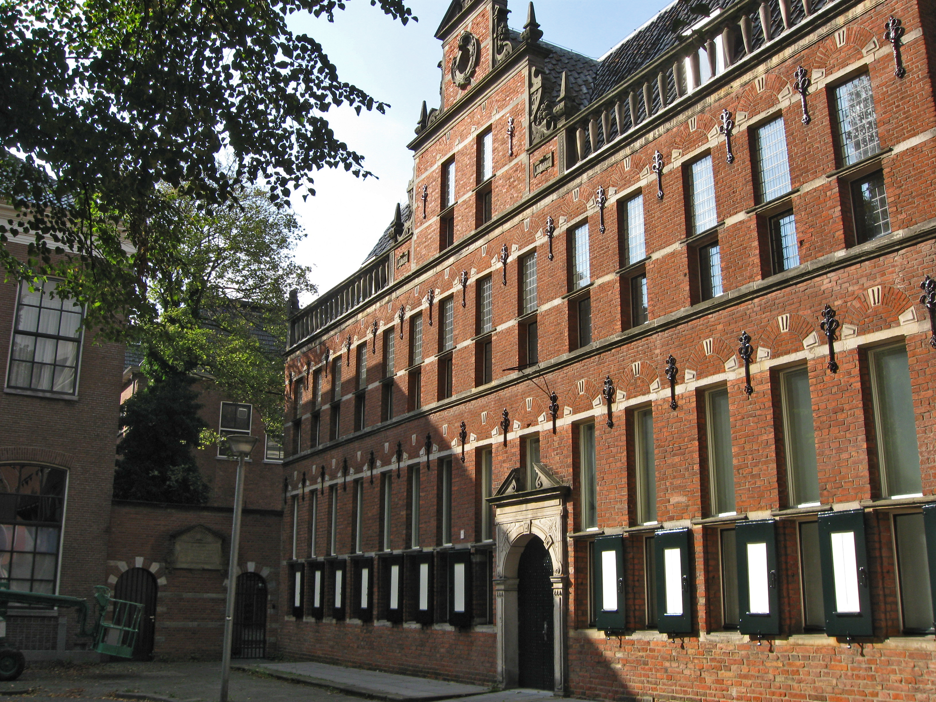 Groningen, Guyotplein 3, Veertien traveeën breed pand met verdieping onder dwars zadeldak waarvoor in 1930 een Vlaamse top is hersteld. Boven de tweemaal veertien smalle Groninger vensters geblokte ontlastingsbogen; de gevels ter weerszijden van de top bekroond door een herbouwde balustrade, tussen wapenleeuwen op pilasters die het bouwjaar 1627 dragen; gebeeldhouwd ingangspoortje; 32 sierankers; rm 18477